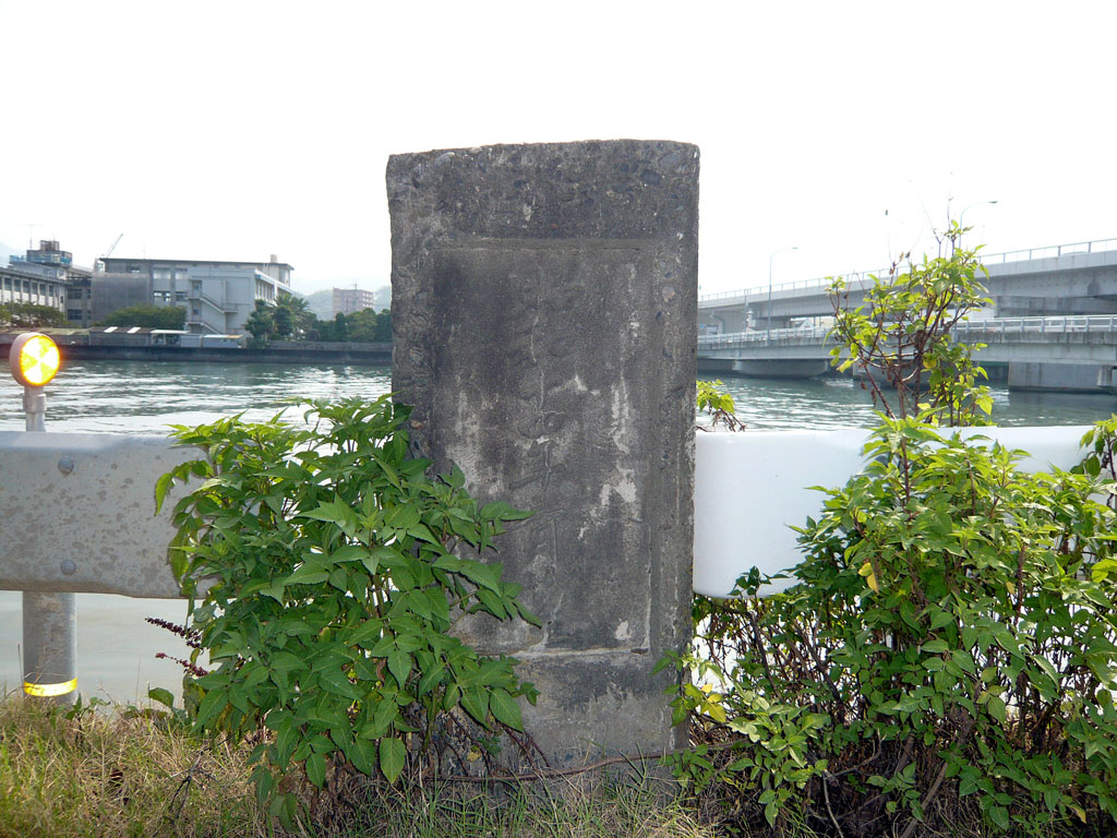 itazimabasi